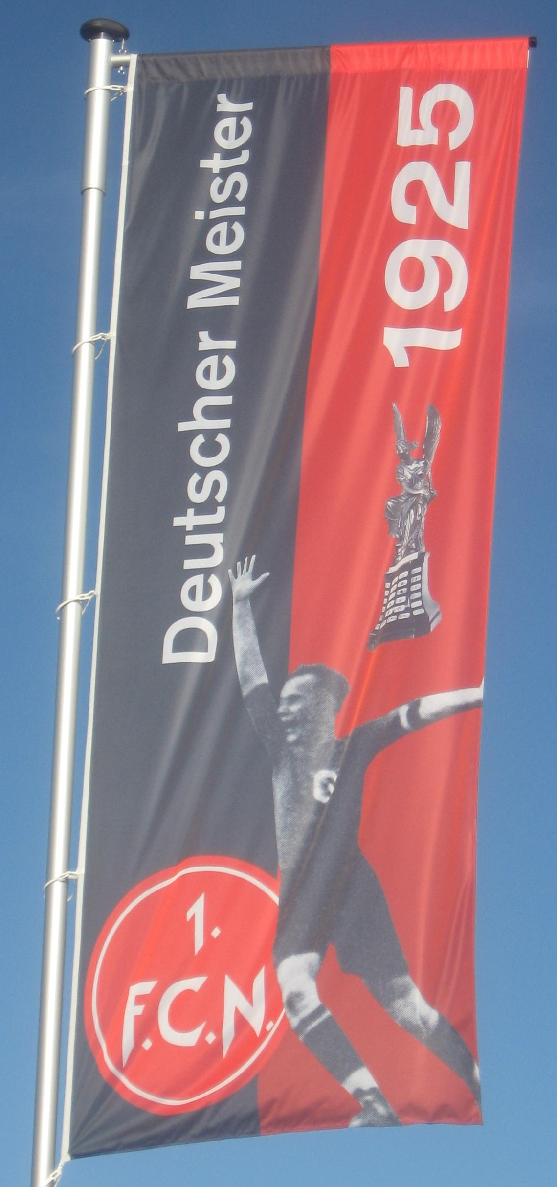 Fahne des 1. FC Nürnberg mit der Jahreszahl des Gewinnes der Deutschen Meisterschaft.